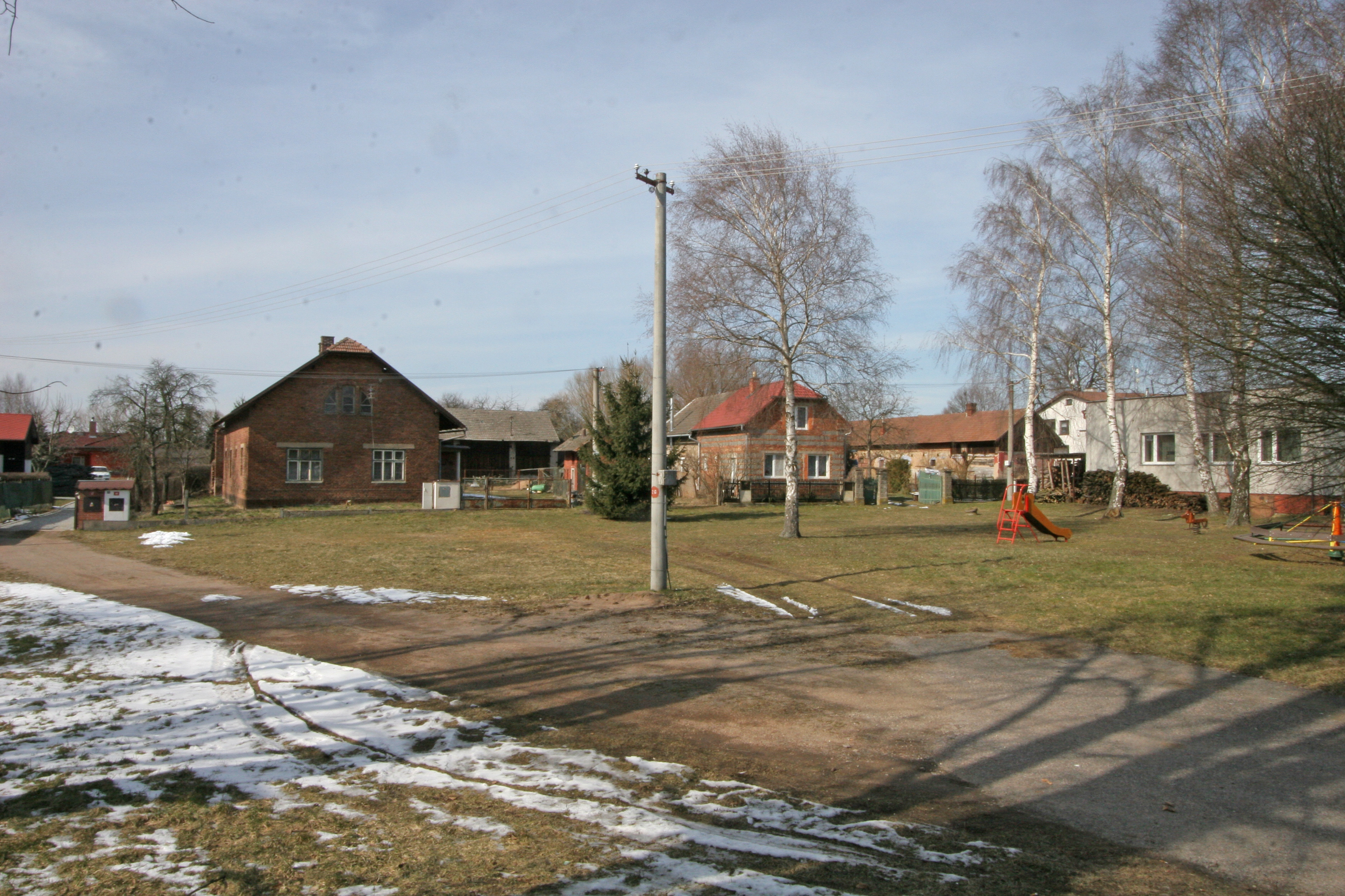 Trnava čp. 17 a 38